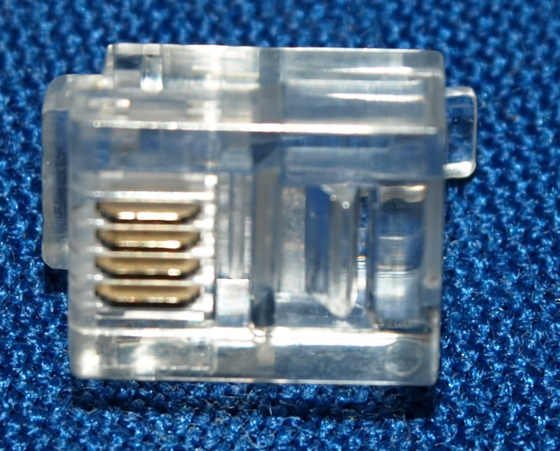 Conector RJ-11